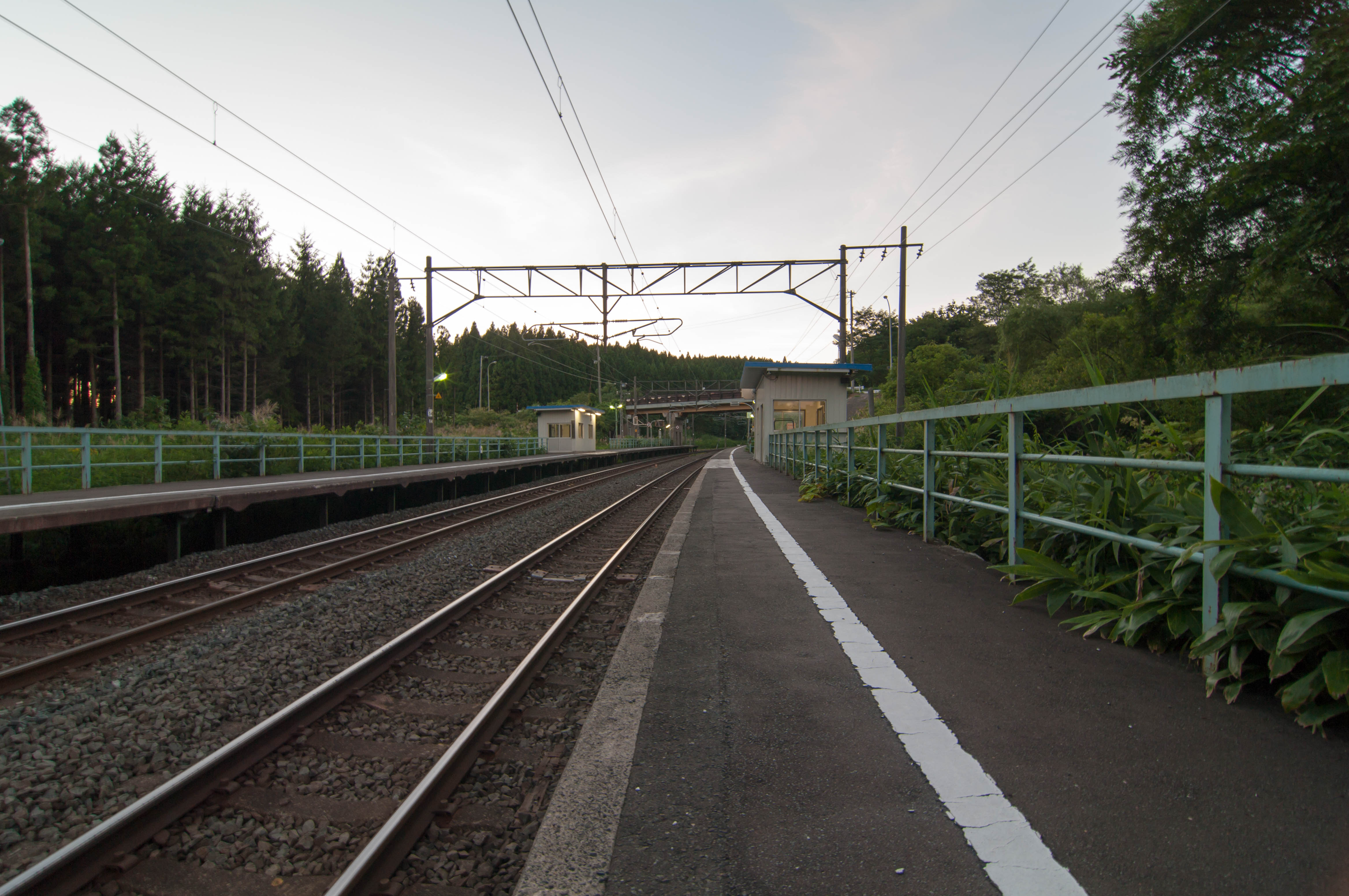 東日本旅客鉄道東北本線千曳駅ホーム全景